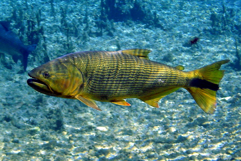 Dourado (Salminus brasiliensis) em Bonito.